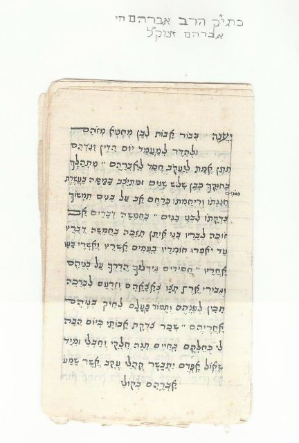 פיוטים לימים הנוראים - קונטרס בכתב יד של הרב אברהם חי אברהם